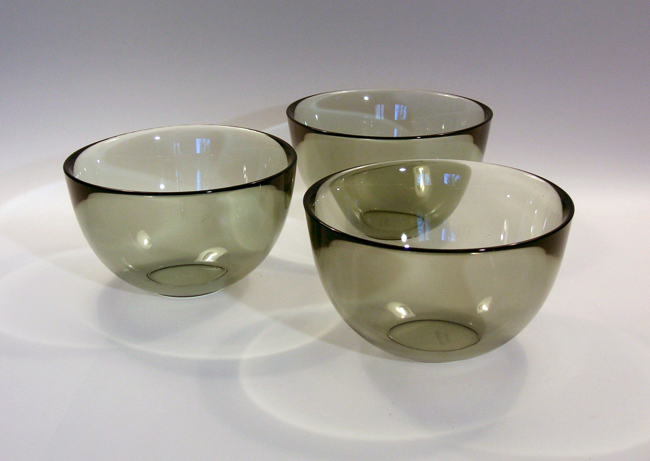 Orrefors Glasschale "Fuga"